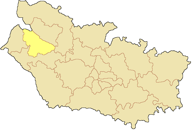 Canton d'Abbeville-2 dans le département de la Somme